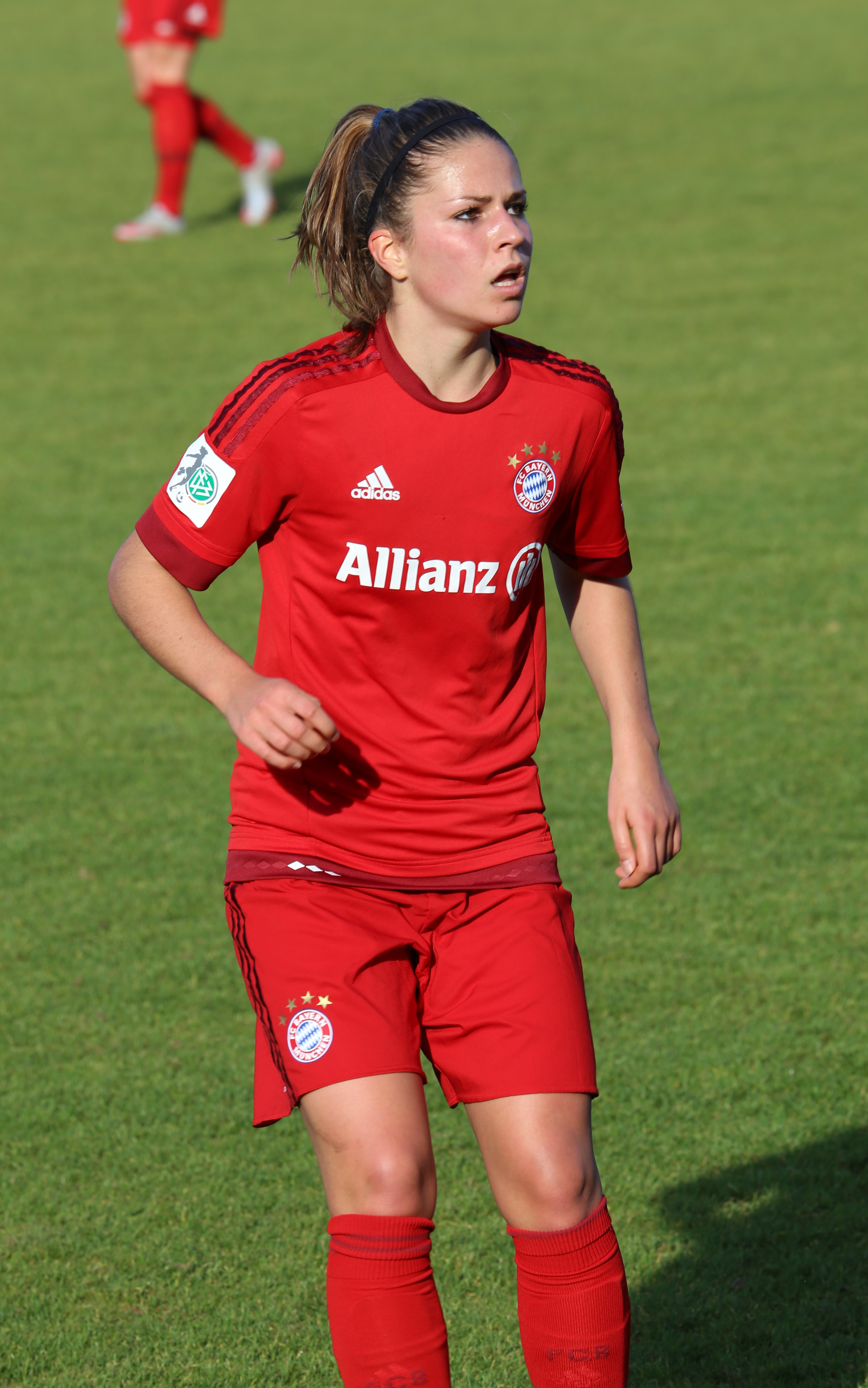 Melanie Leupolz (FC Bayern München) im DFB-Pokal-Achtelfinale zwischen FC Bayern München und 1. FFC Frankfurt, Ergebnis 2:0, Stadion an der Grünwalder Straße